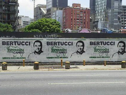 Campaña de Javier Bertucci en las elecciones presidenciales en Venezuela de 2018.